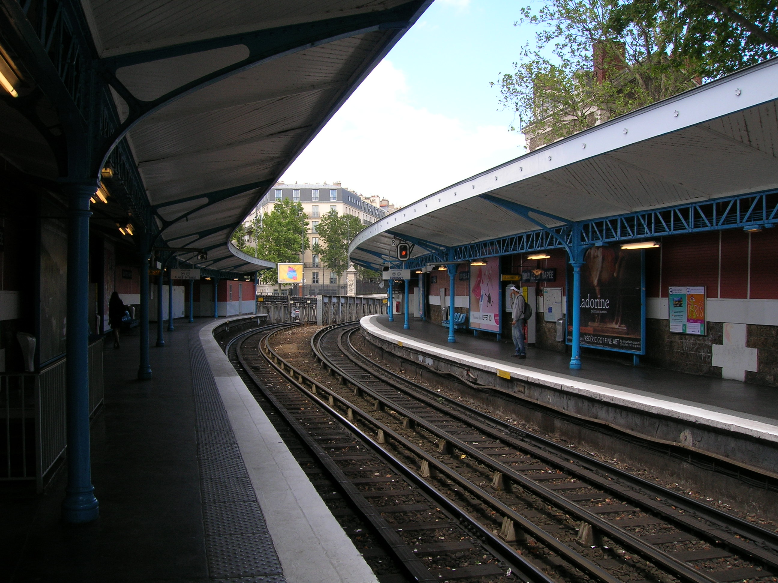 Station de métro "Quai de la Rapée", Parsis